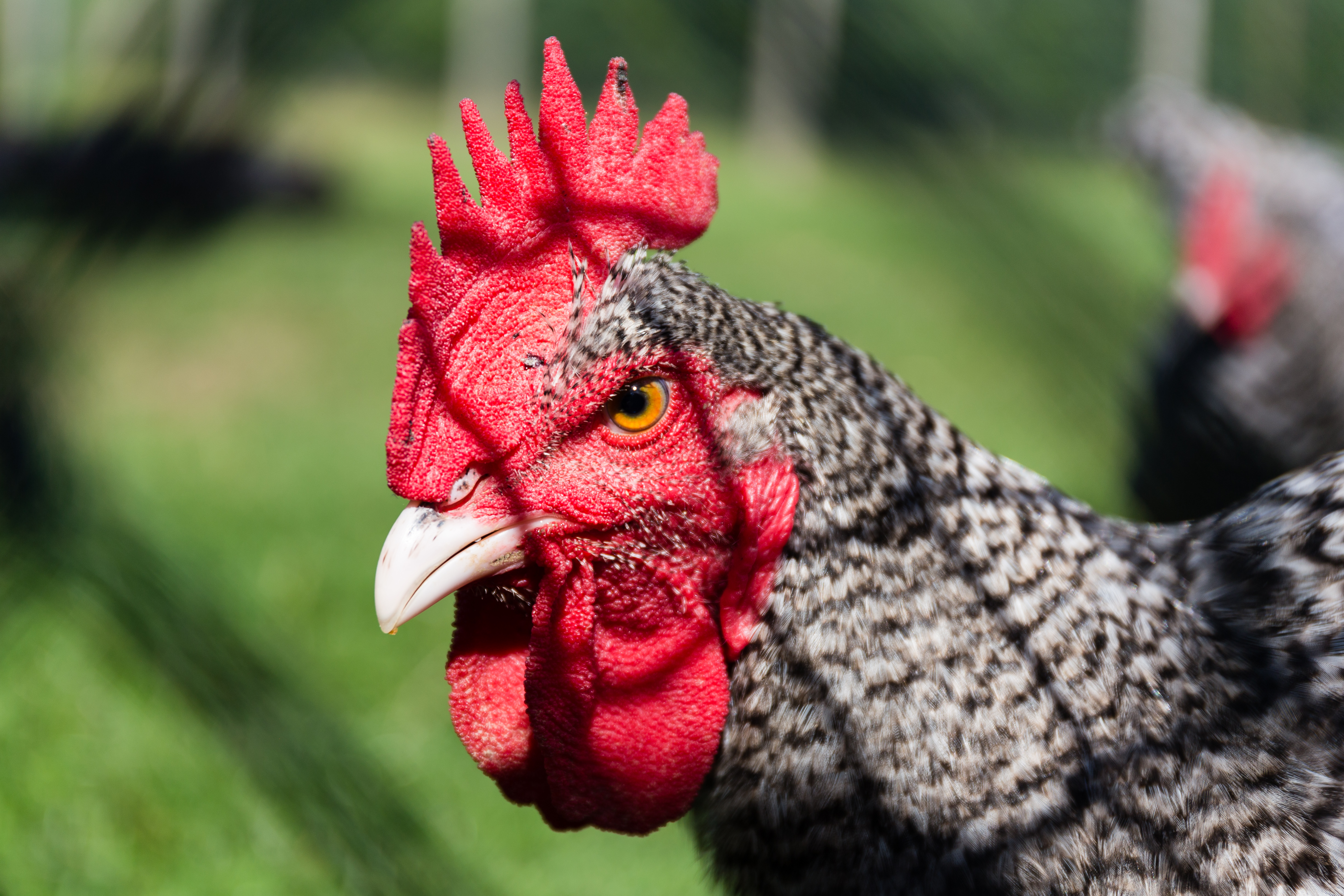 Cod coucou de Rennes à l'Écomusée du pays de Rennes.